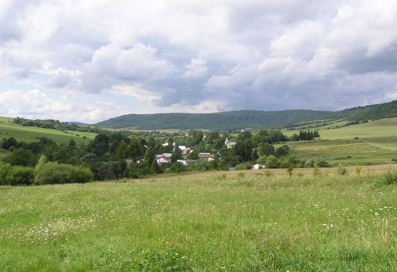 Celkový pohľad